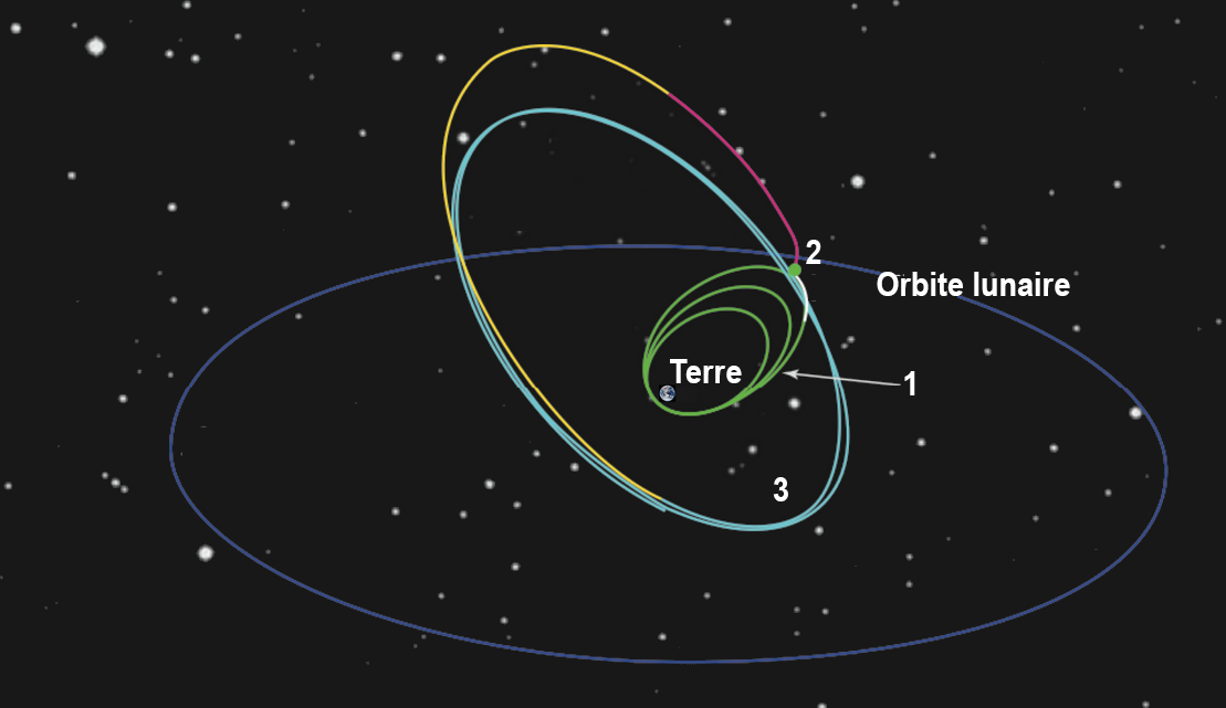 Schéma des manœuvres effectuées par le télescope spatial TESS pour se placer sur sont orbite finale. 1 -Le télescope est placé sur une orbite haute et élève en deux orbite son apogée en utilisant sa propulsion 2 -- L'assistance gravitationnelle de la Lune qu'il survole est utilisée pour modifier son inclinaison orbitale qui atteint au final 40° par rapport au plan de l'écliptique. 3 - Des corrections avec sa propulsion permettent d'atteindre l'orbite finale avec un apogée et un périgée respectivement à 120 000 km et 400 000 km de la Terre.